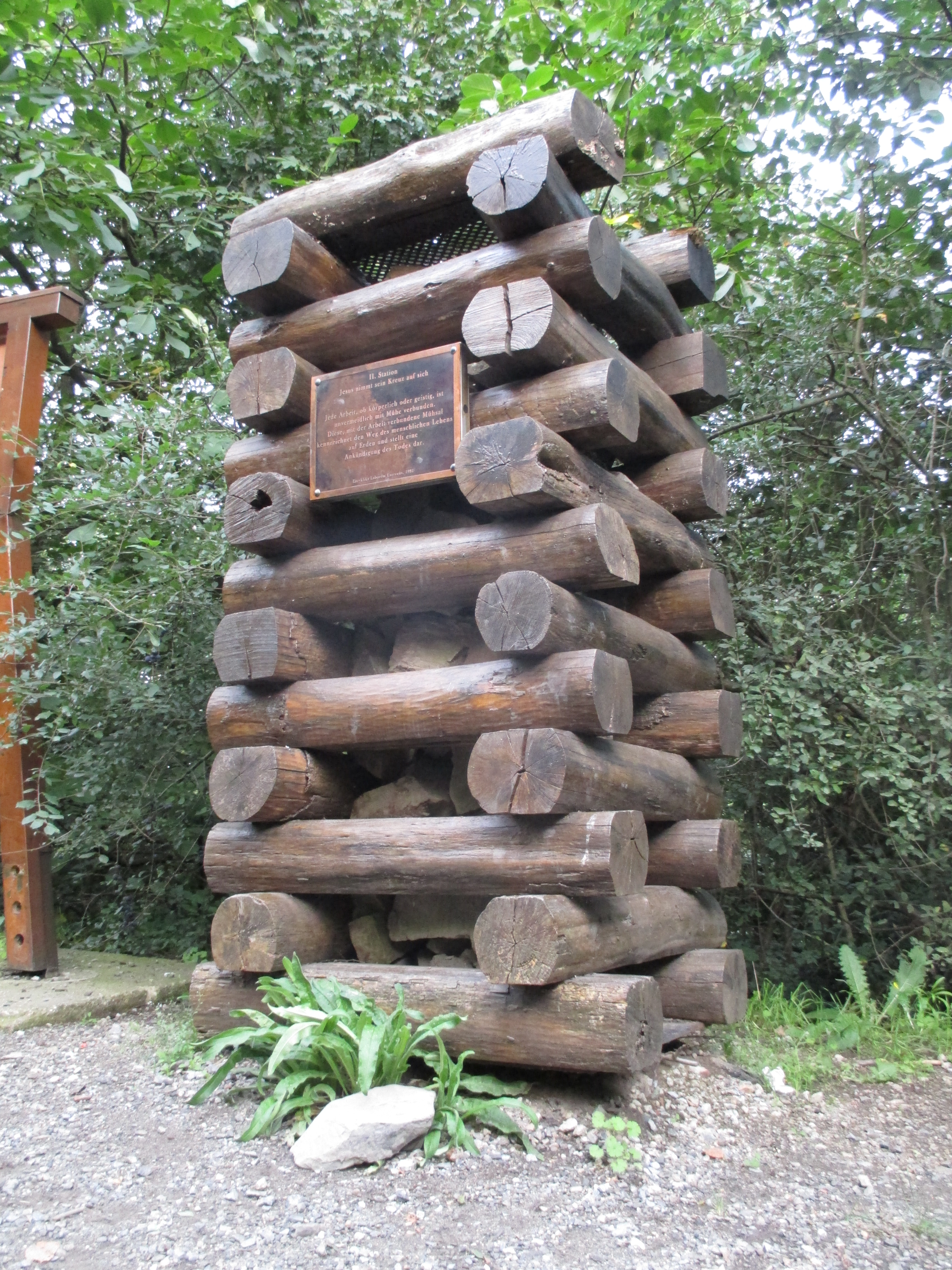 Station 2 des Bergbaukreuzwegs an der Halde Haniel